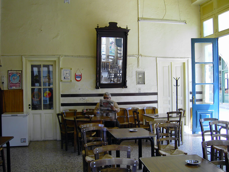 Kafenio in Archanes, Crete